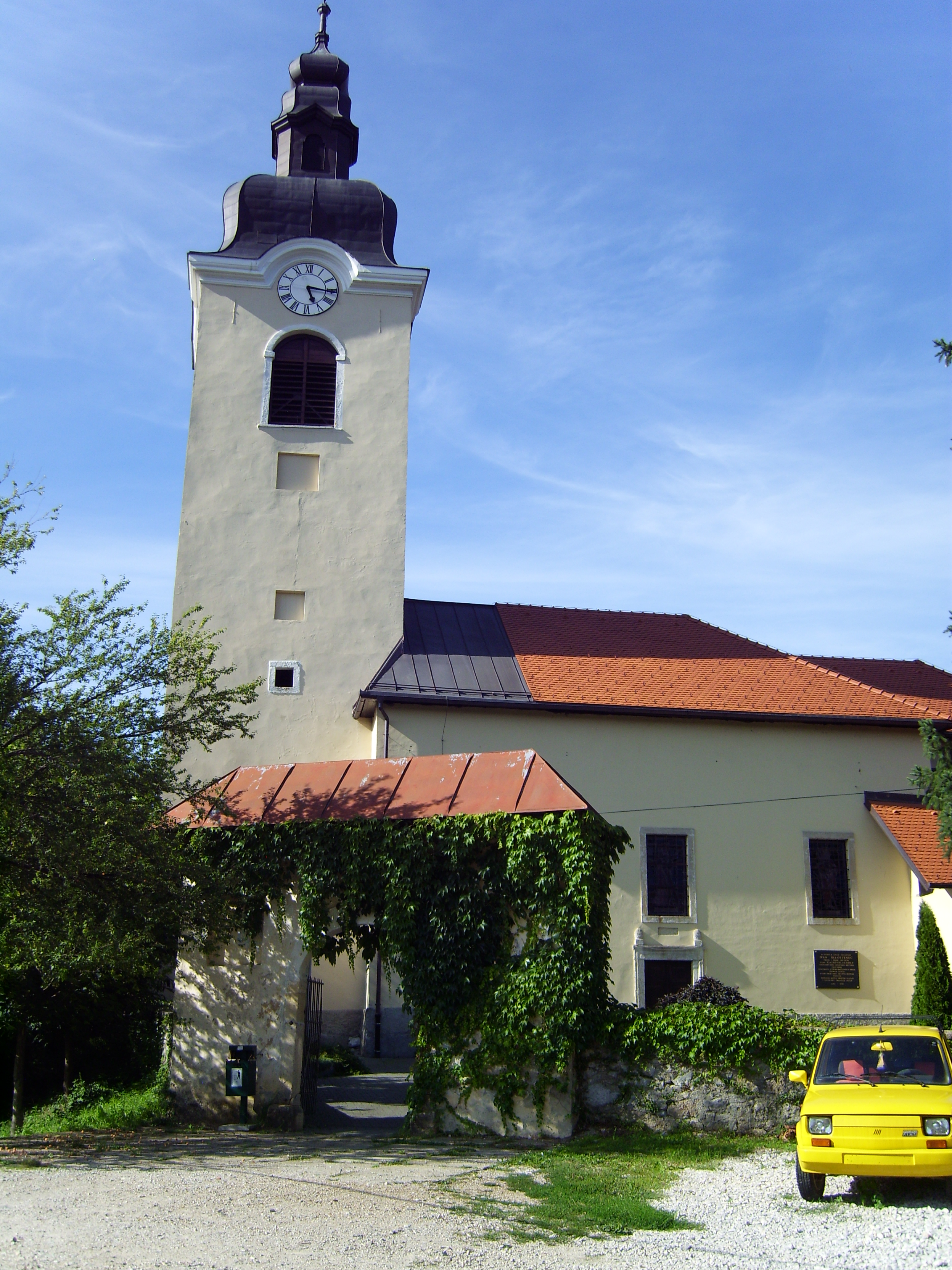 Die Kirche des Heiligen Veits in Ozalj San Vito , St Vid